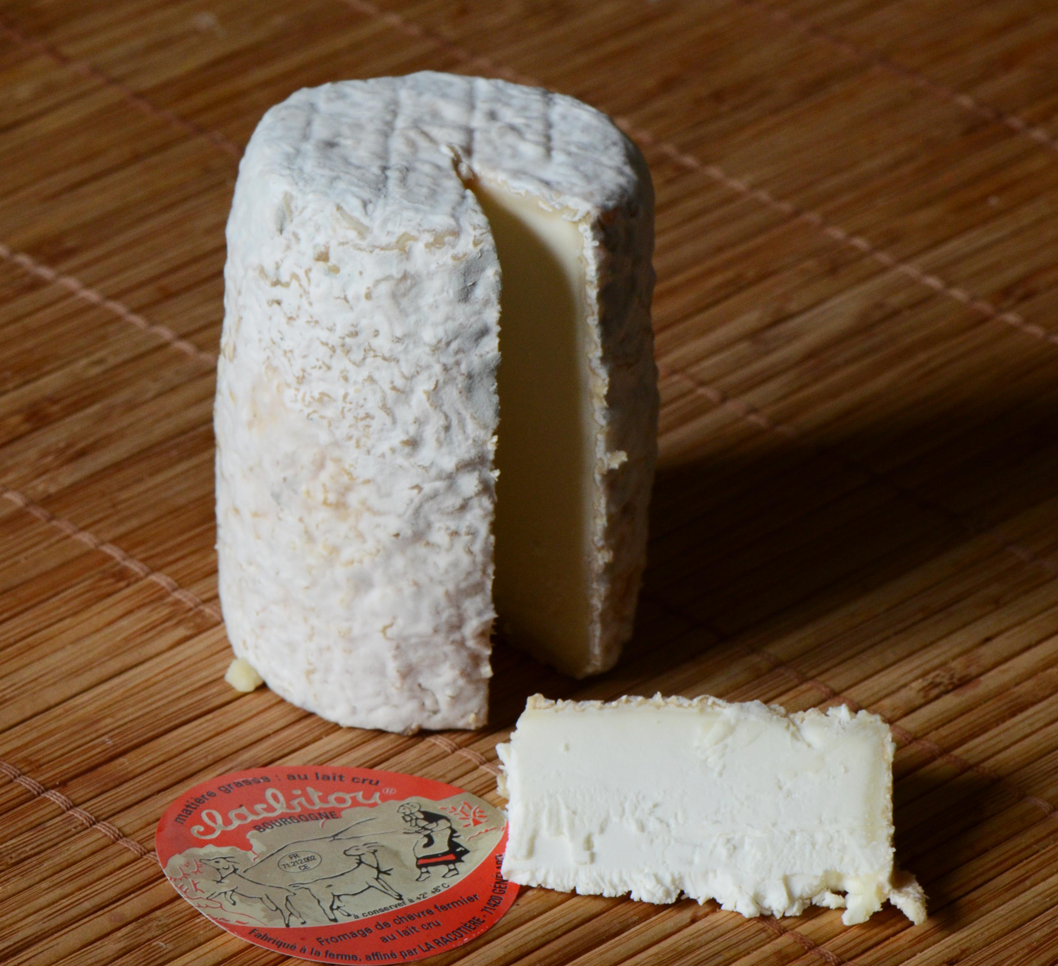 Clacbitou marque commerciale à ne pas confondre avec l'appellation populaire claquebitou ou quiaque-bitou en langue bourguignonne désignant un fromage de la Bourgogne.